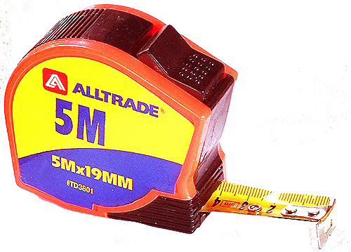 Tape ruler